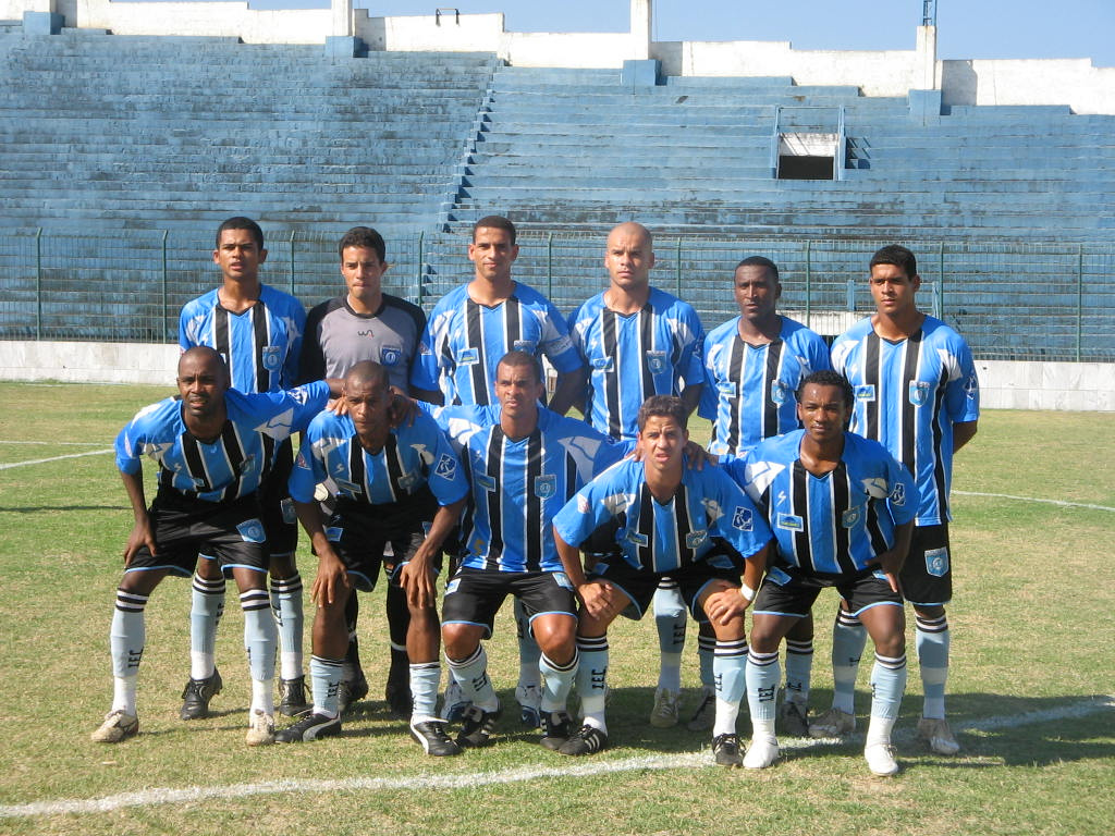 Equipe do Independente, em 2007.